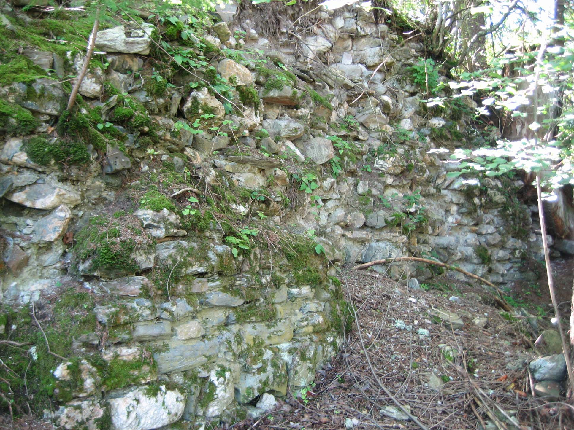 Westmauer